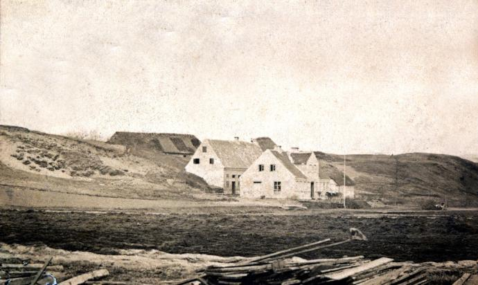 Aagaardsstedet: Før privilegiet blev givet, lå der kun få spredte gårde og husmandssteder ved fjorden.